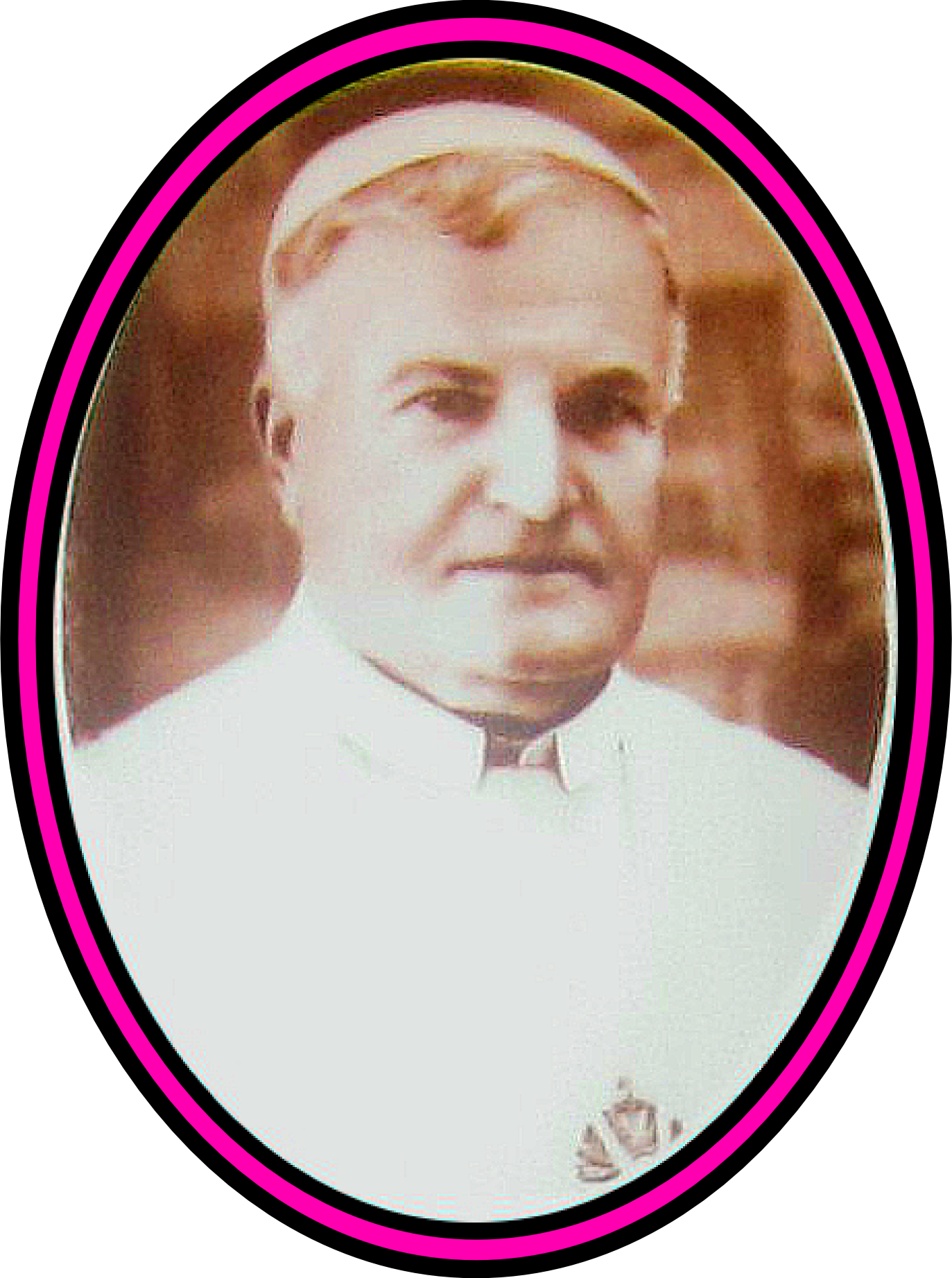 Fotografia z tablicy nagrobnej bpa. Romana Marii Jakuba Próchniewskiego w katedrze mariawickiej w Płocku.